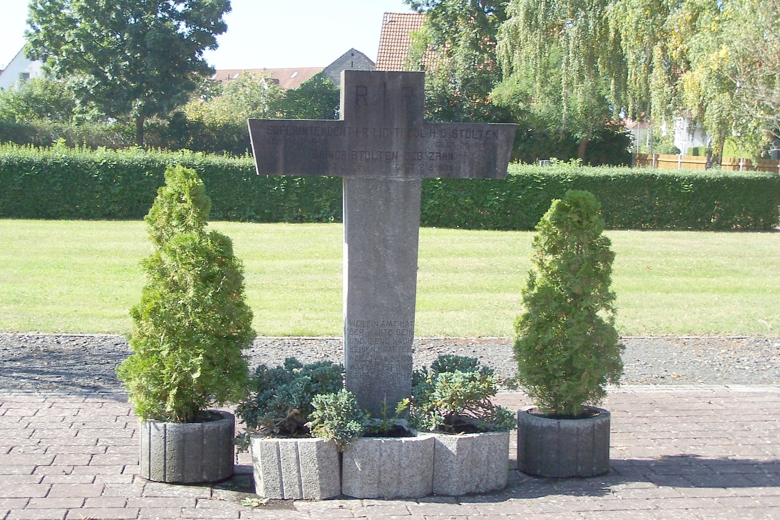 Die Grabstätte des Gerstunger Superintendenten Stölten am Haupteingang zum Gemeindefriedhof Gerstungen.